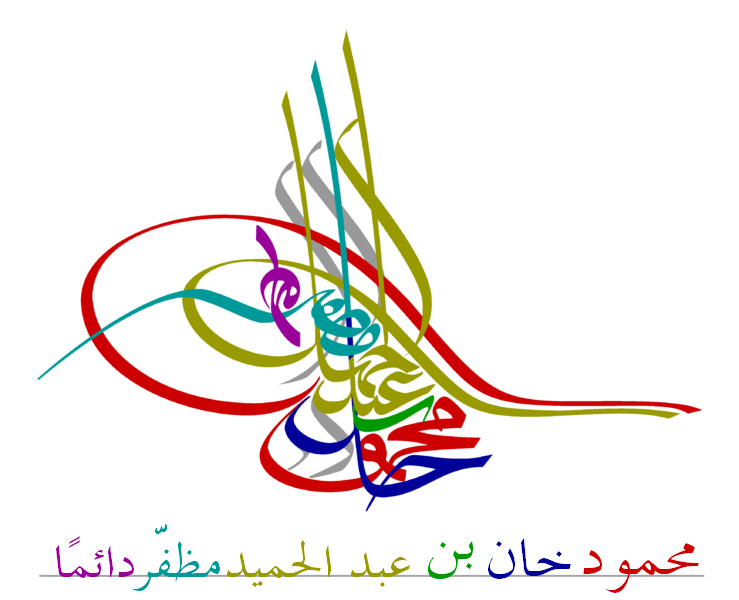 Sultan Mahmud II's tughra